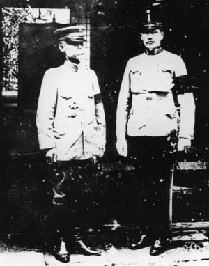 長岡中将（左）とレルヒ少佐（右）。